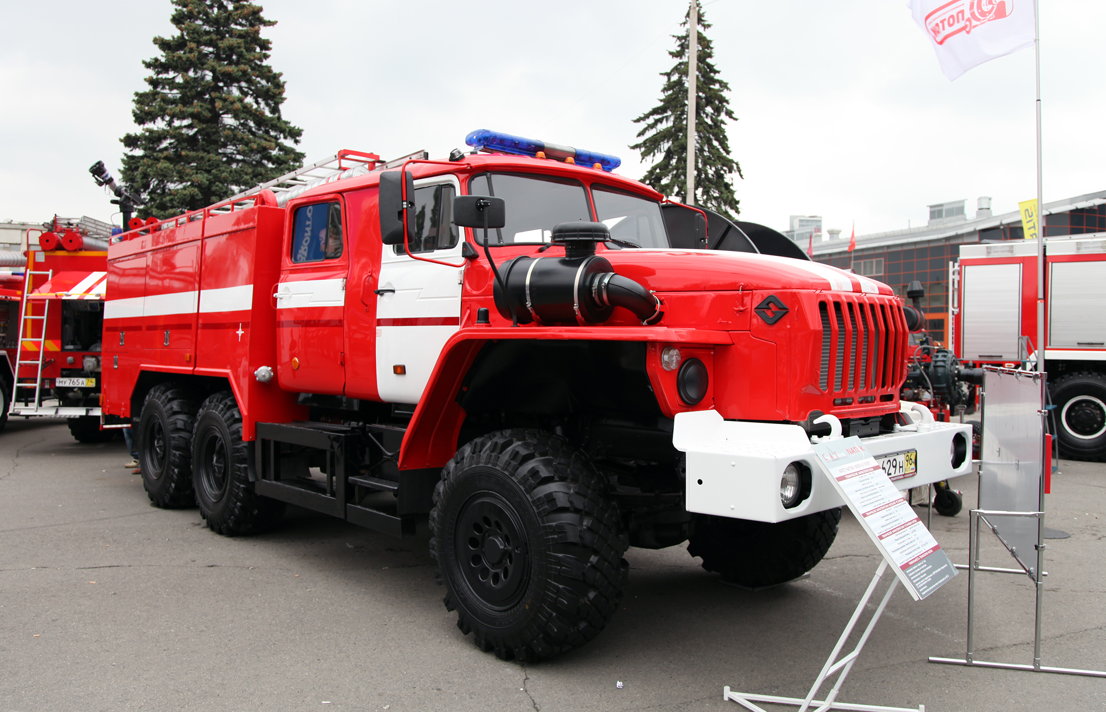 АПСТ NATISK-3000 KS на шасси Урал-5557 (Firefighting vehicle NATISK-3000 KS on Ural-5557 chassis)